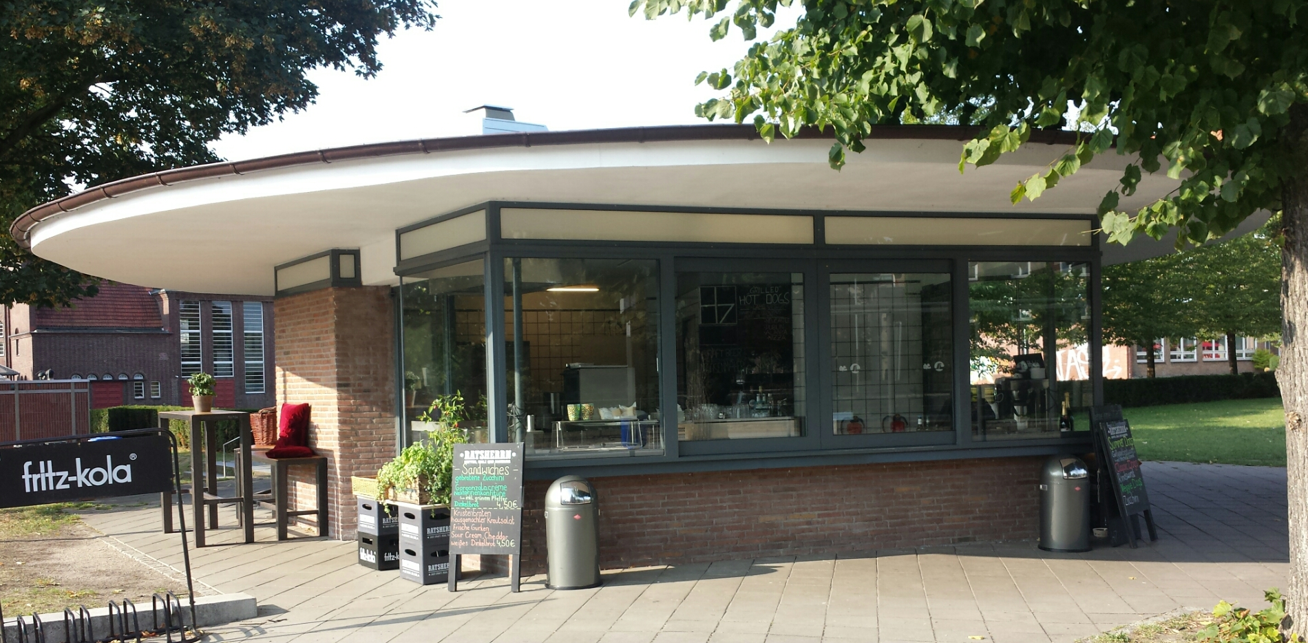 Denkmalgeschützter Kiosk am Holstentorplatz in Lübeck 2018, nach der Sanierung, im Hintergrund links die Holstentorhalle